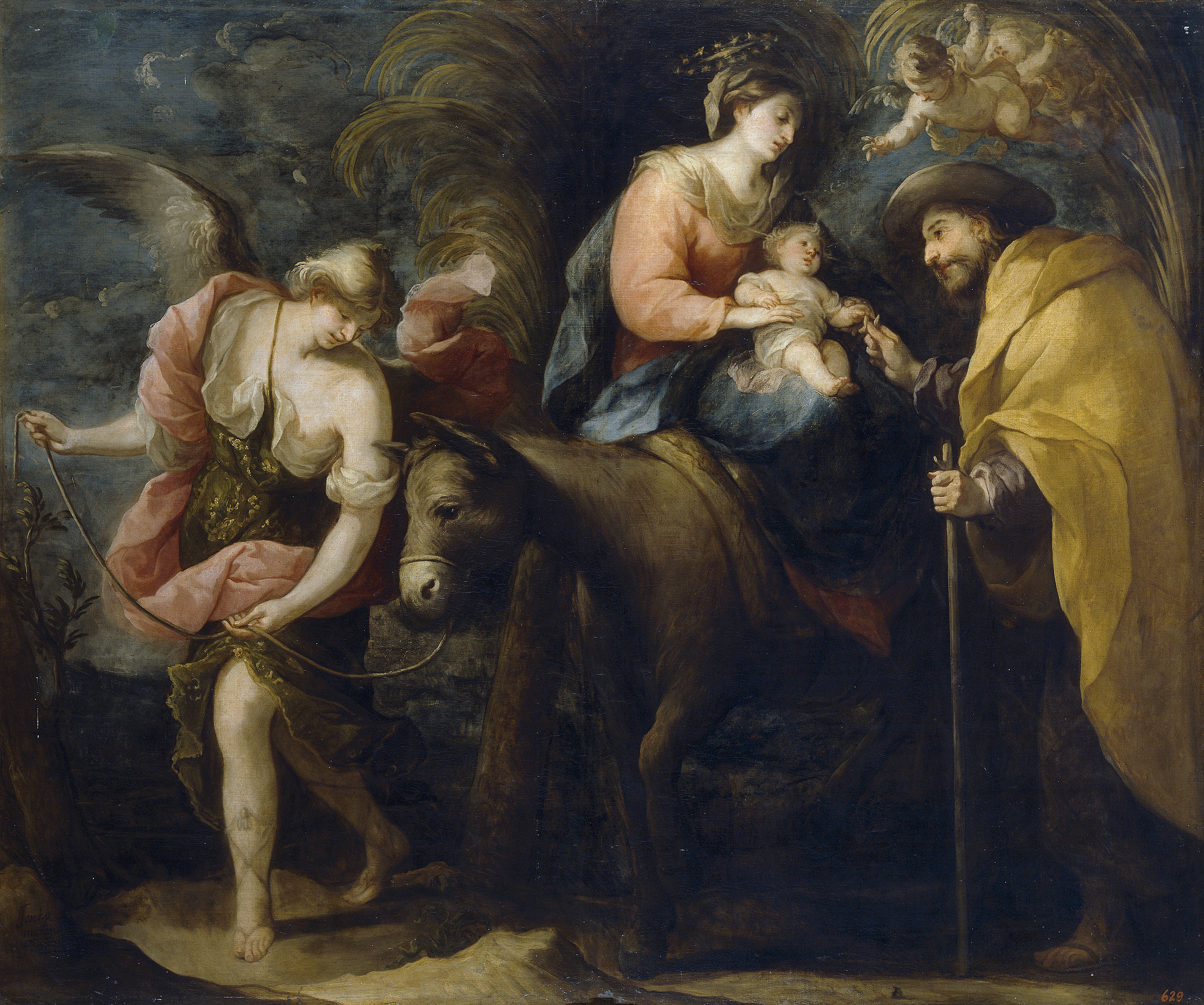 La obra representa a los tres miembros de la Sagrada Familia cristiana huyendo hacia Egipto para impedir que el rey Herodes el Grande diera muerte al Niño Jesús.